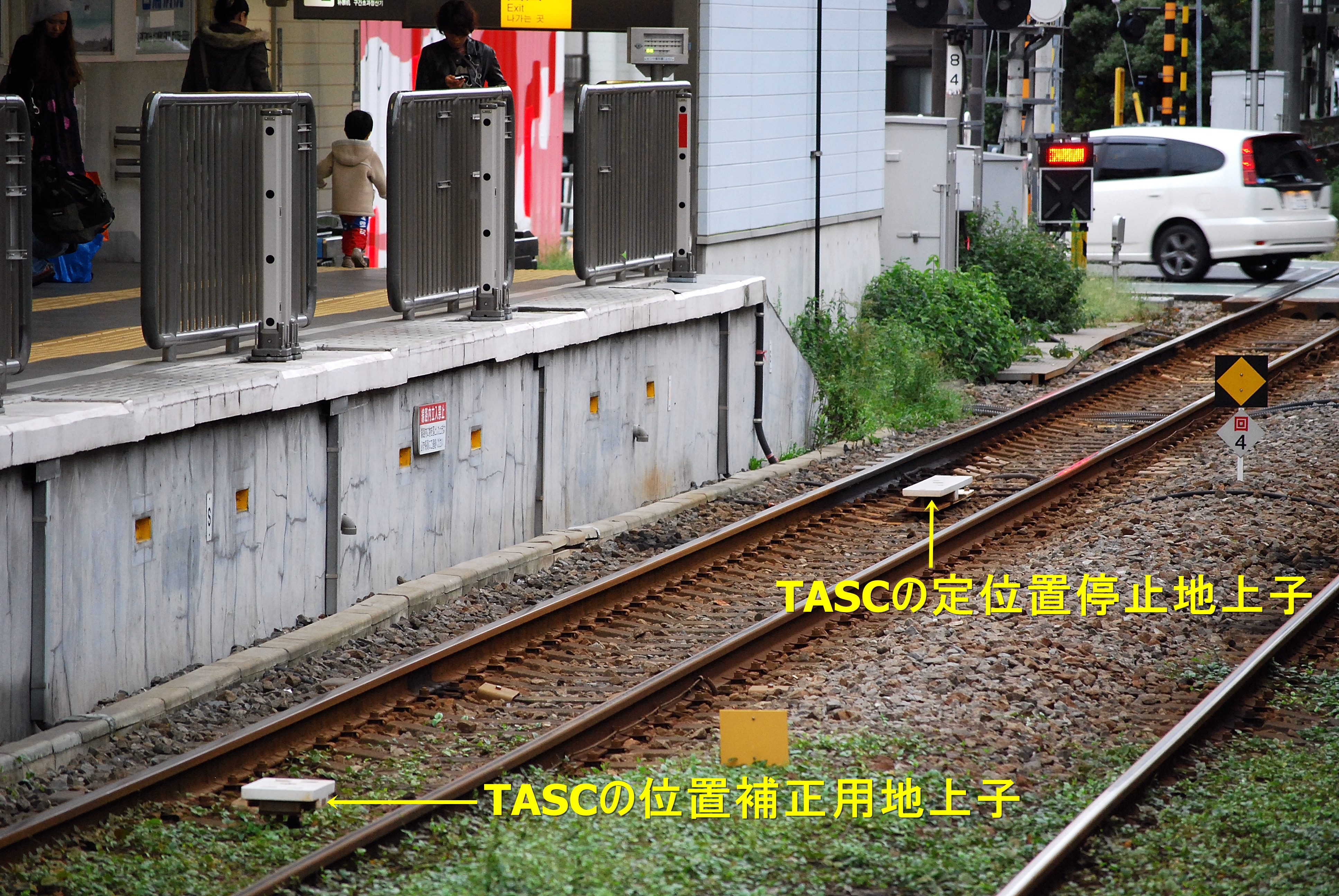 東急多摩川線に設置されている、TASC地上子の写真と説明文。